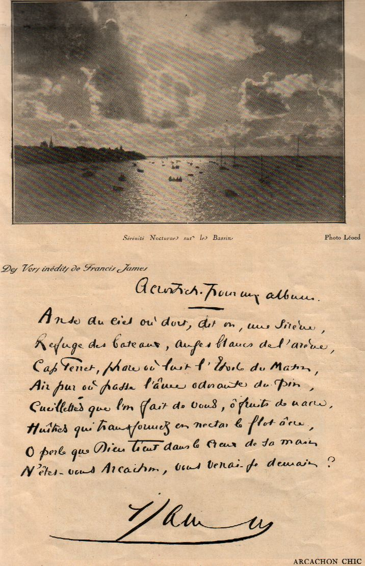 Acrostiche manuscrit de Francis Jammes sur le bassin d'Arcachon (vers inédits, p.5, in Arcachon Chic N°4, Janvier 1930)